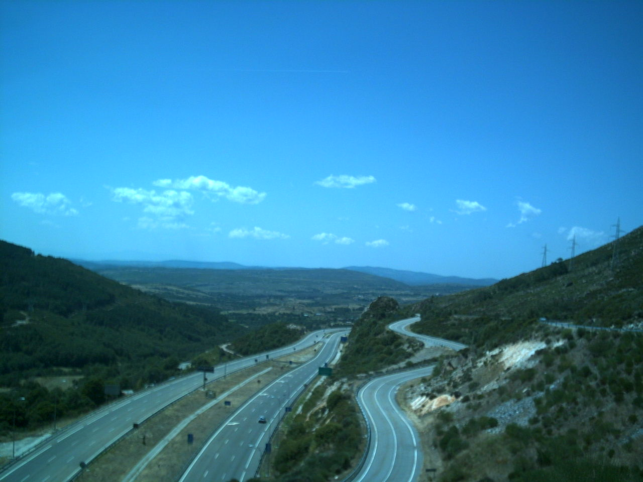 Autovía A-52 y carretera N-525 a la altura de A Canda (A Mezquita, Ourense, España). tomada 2005-08-11